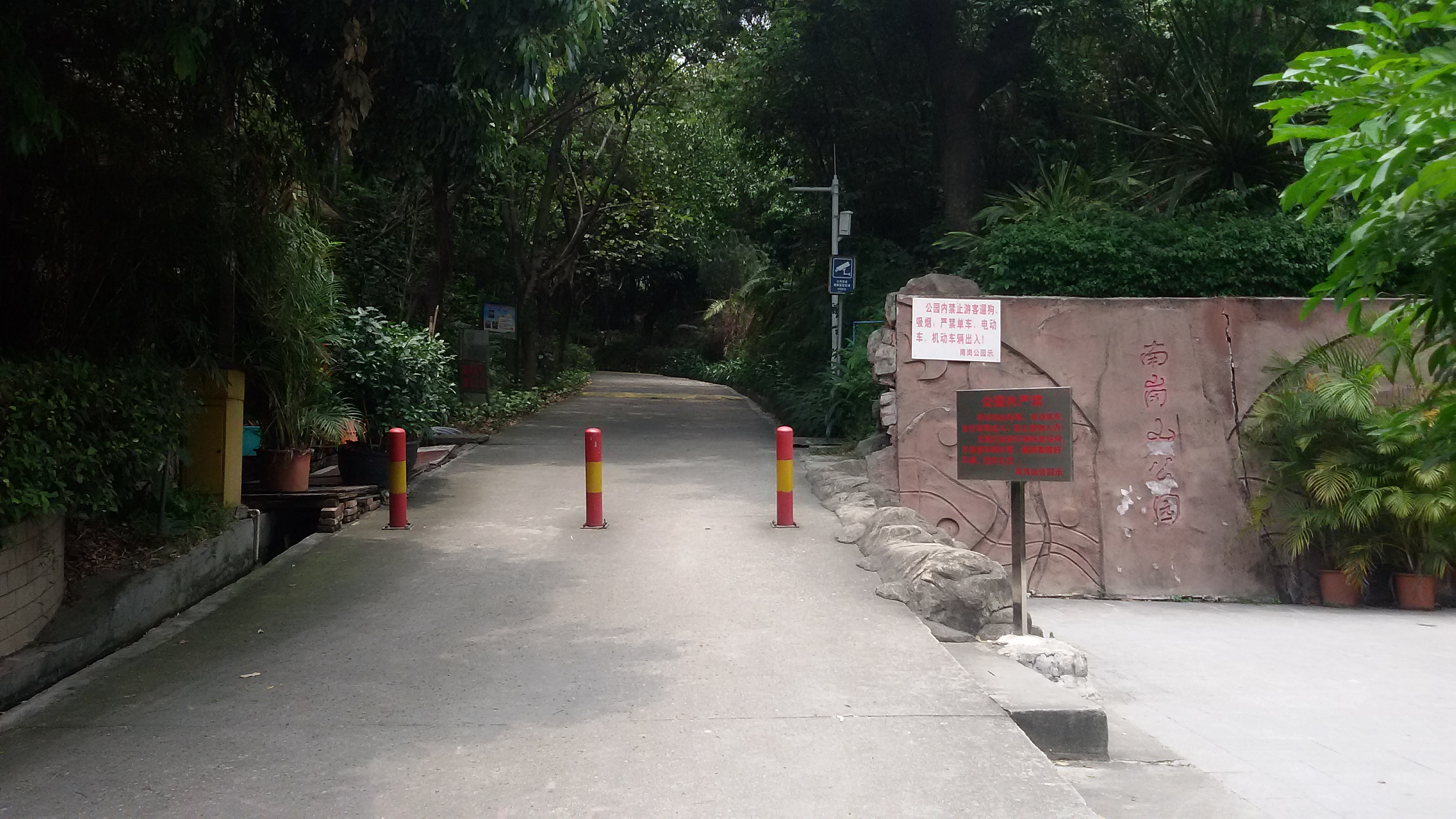 粵語: 南崗山公園